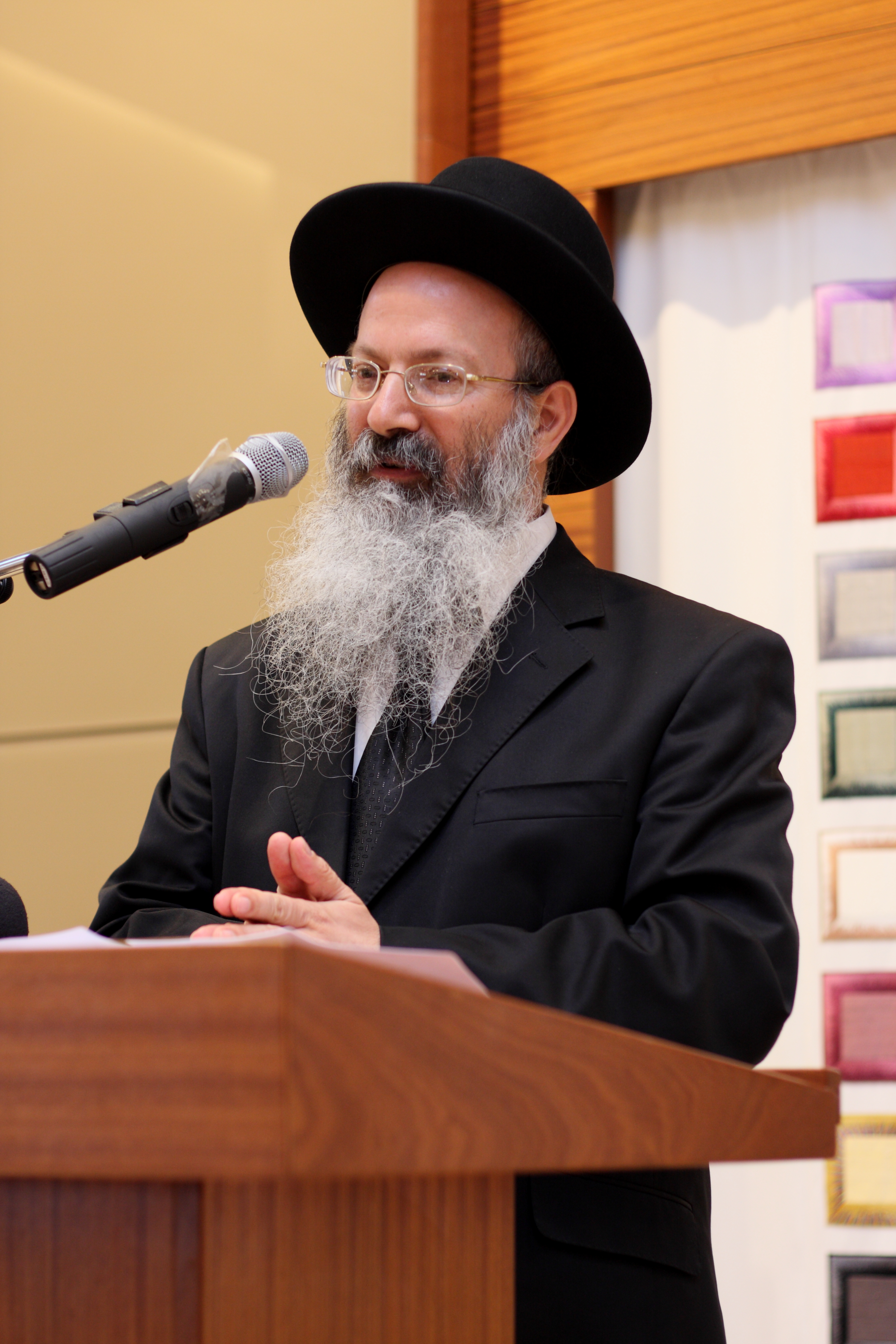 הרב אליעזר מלמד בטקס קבלת פרס היצירה היהודית - ד' אב ה'תשע"ג